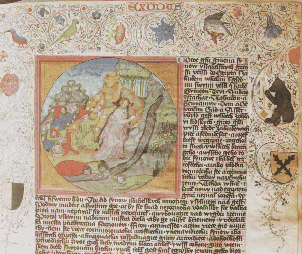 Boskovická bible